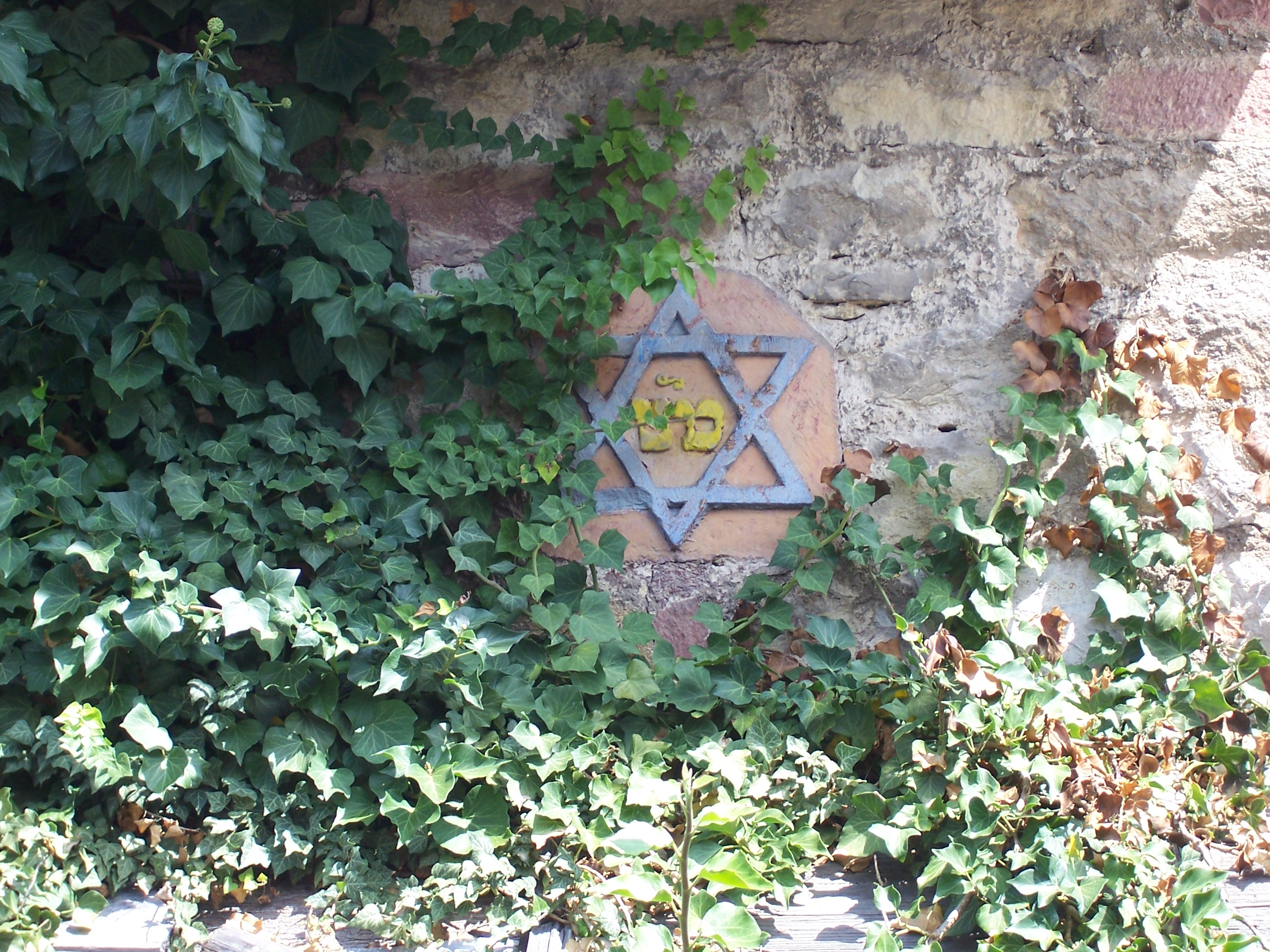 Traustein (oder Hochzeitsstein) an der ehemaligen Synagoge (erbaut ca. 1769) in Dittigheim (Tauberbischofsheim, Synagogengasse 4). Bei der Hochzeit zerschlug der Bräutigam daran ein Glas, um Übel von der Ehe fernzuhalten. Der Traustein wurde am 11. Juni 1979 vom Regierungspräsidium Stuttgart als Kulturdenkmal von besonderer Bedeutung in das Denkmalbuch eingetragen. Literatur: Elmar Weiß: Dittigheim – Eine alte Siedlung im Taubertal. Interessengemeinschaft Heimatbuch Dittigheim (Hrsg.), Tauberbischofsheim 1987, S.333. Weblink: Dittigheim – Jüdische Geschichte/Betsaal/Synagoge bei alemannia-judaica.de